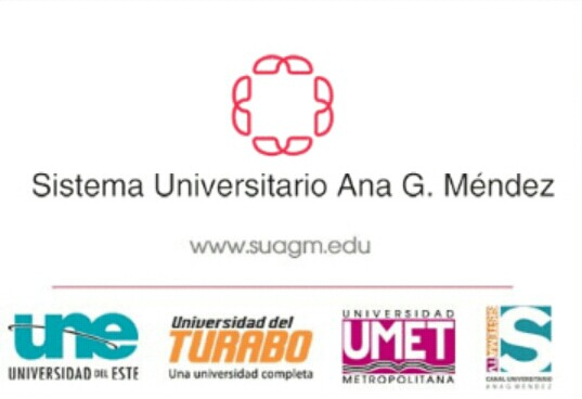 Sistema Universitario Ana G. Méndez, sistema universitario puertorriqueño